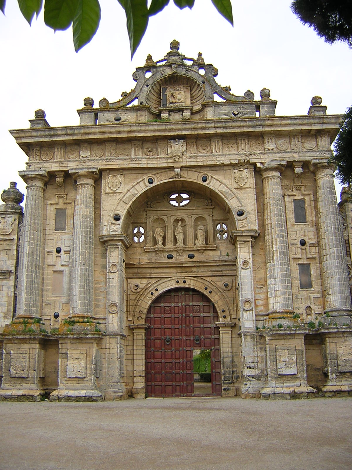 Portada de acceso al Monasterio de la Cartuja de Nuestra Señora de la Defensión (Jerez de la Frontera, España)